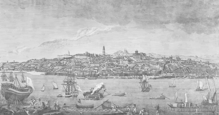 Gravure de Porto.